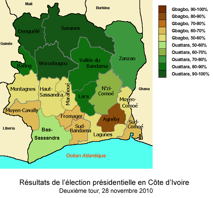 Élections présidentielles en Côte d'Ivoire, résultats du deuxième tour par région